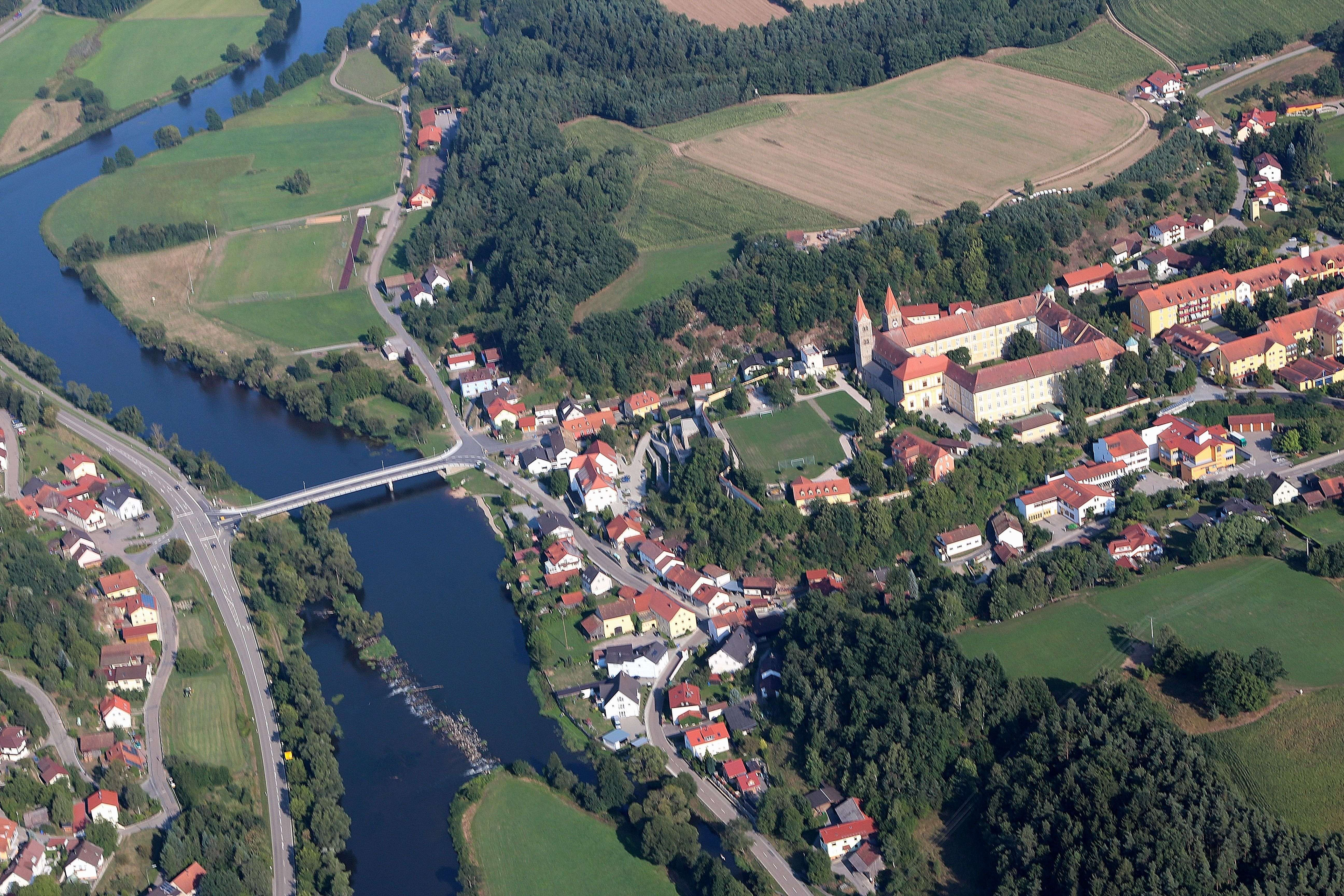 Klosteranlage Reichenbach am Regen, Landkreis Cham, Oberpfaz, Bayern